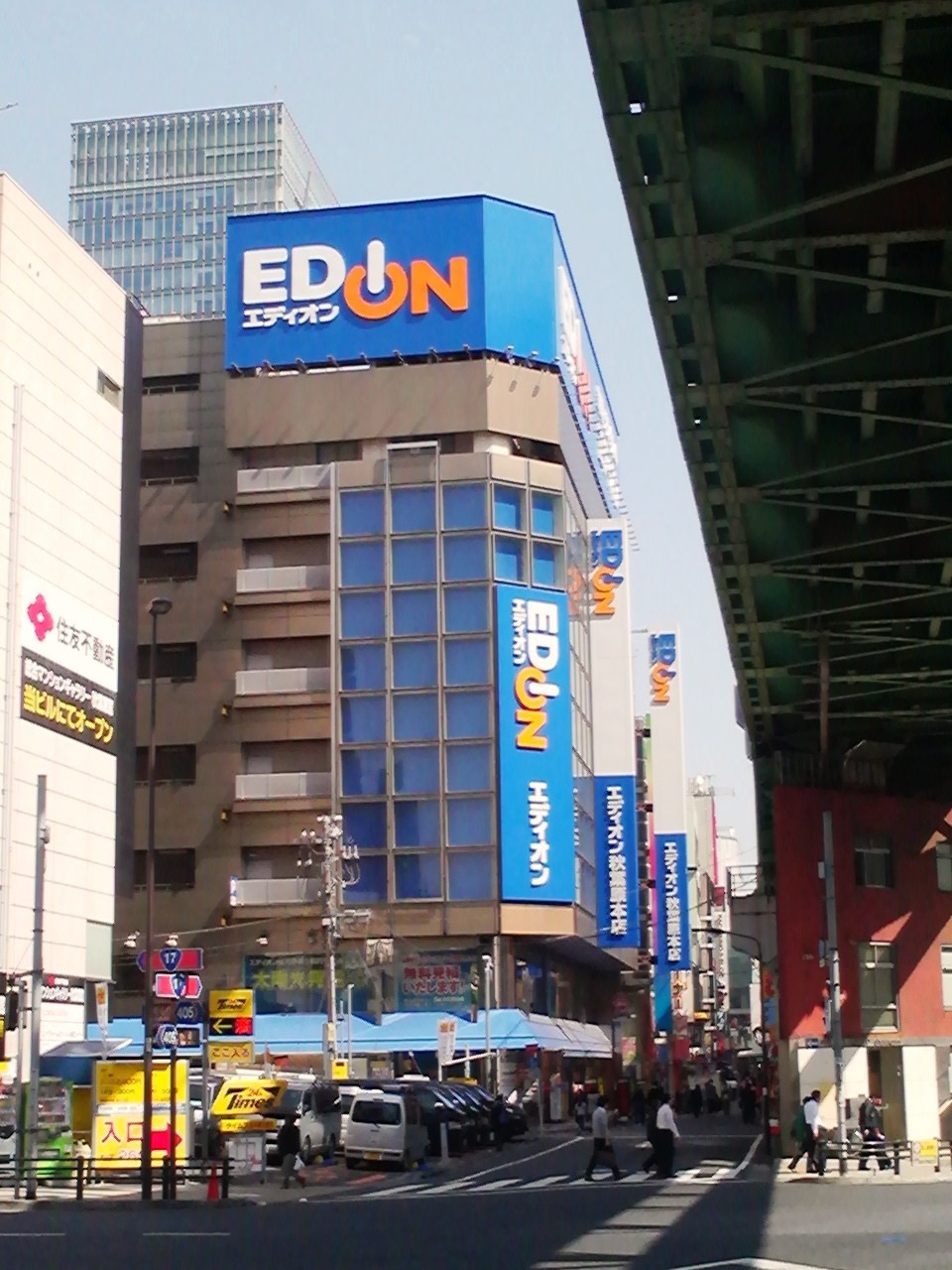 閉店前日のエディオン秋葉原本店を撮影。